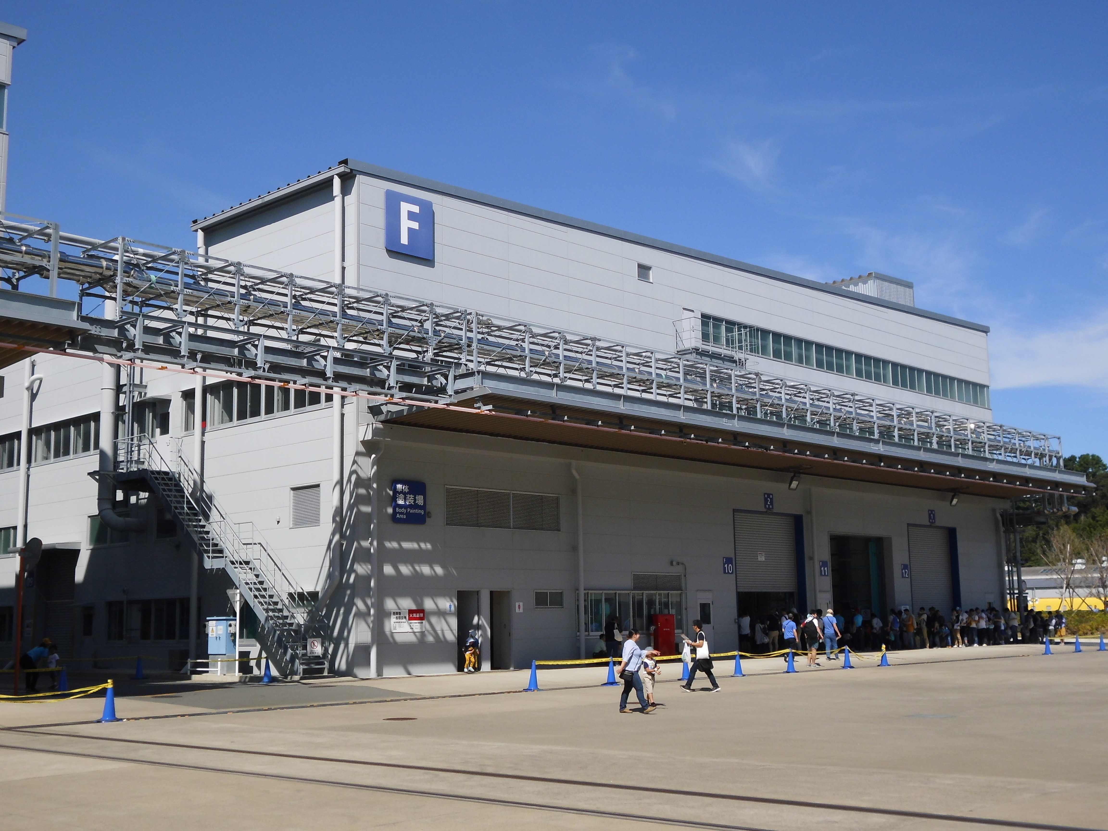 JR東海浜松工場F号棟（車体塗装場）